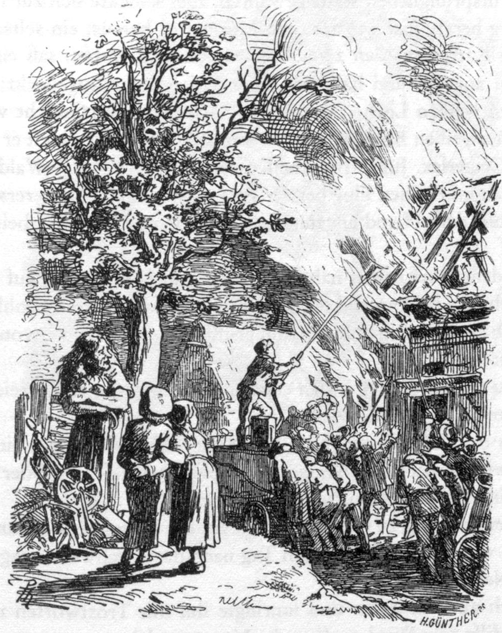 Berthold Auerbach, Schwarzwälder Dorfgeschichten, Der Geigerlex. – „Das brennende Haus war nicht mehr zu retten.“